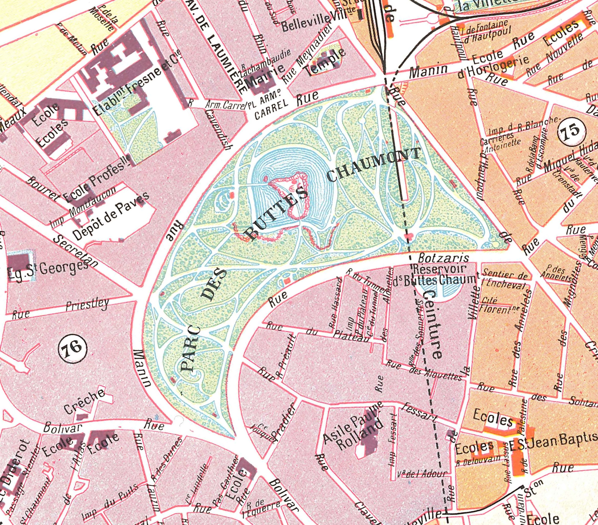 Carte du parc des Buttes-Chaumont et sa situation dans le XIXe arrondissement de Paris.